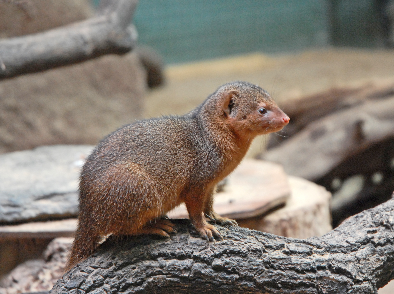 Mangouste, Zwergmanguste, Helogale parvula, Dward Mongoose Le zoo de Berlin a été créé à la fin du 18ème siècle dans l'île aux Paons, puis transféré en 1844 dans un parc près du centre-ville aménagé par Peter Joseph Lenné. Il est toujours dans cet espace situé aujourd'hui au coeur de Berlin. Les premiers pavillons du zoo ont été conçus dans le style des pays d'où provenaient les animaux qui y étaient hébergés. Le zoo et l'aquarium de Berlin ont reçu près de 3.000.000 de visiteurs en 2010. Le zoo est célèbre dans le monde et le plus visité en Europe. article de Wikipedia site officiel du zoo de Berlin